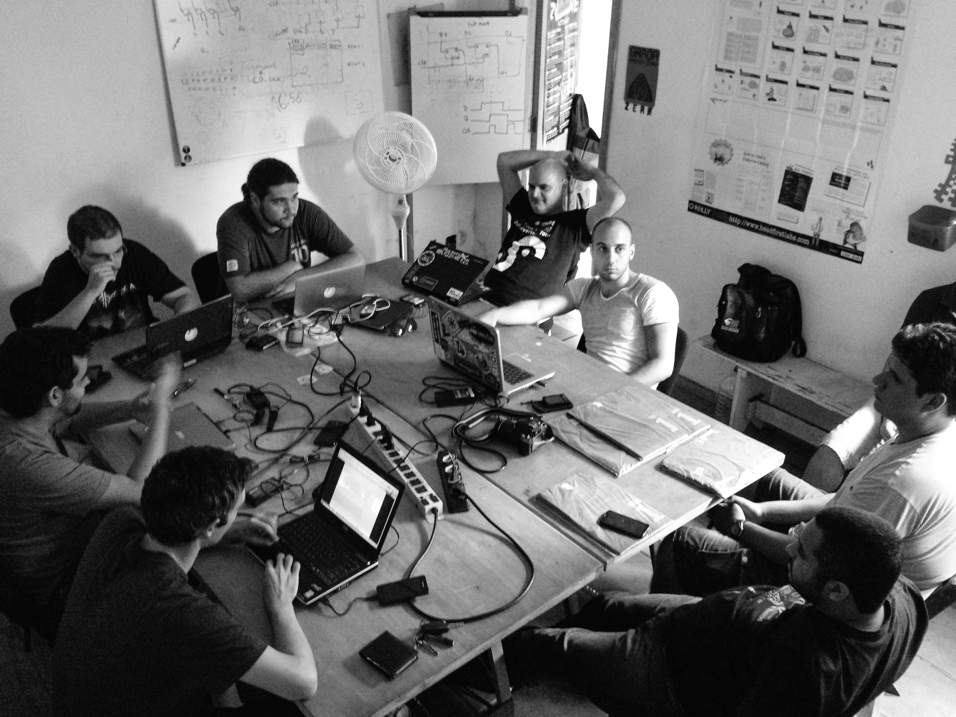 Primeiro Wikiday realizado no Brasil, no caso, realizado no Garoa Hacker Clube.